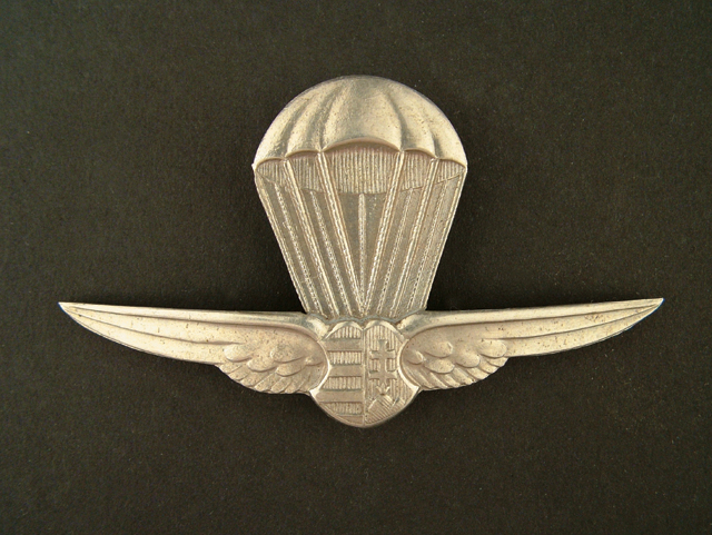 Magyar Demokratikus Honvédség Ejtőernyős Jelvény